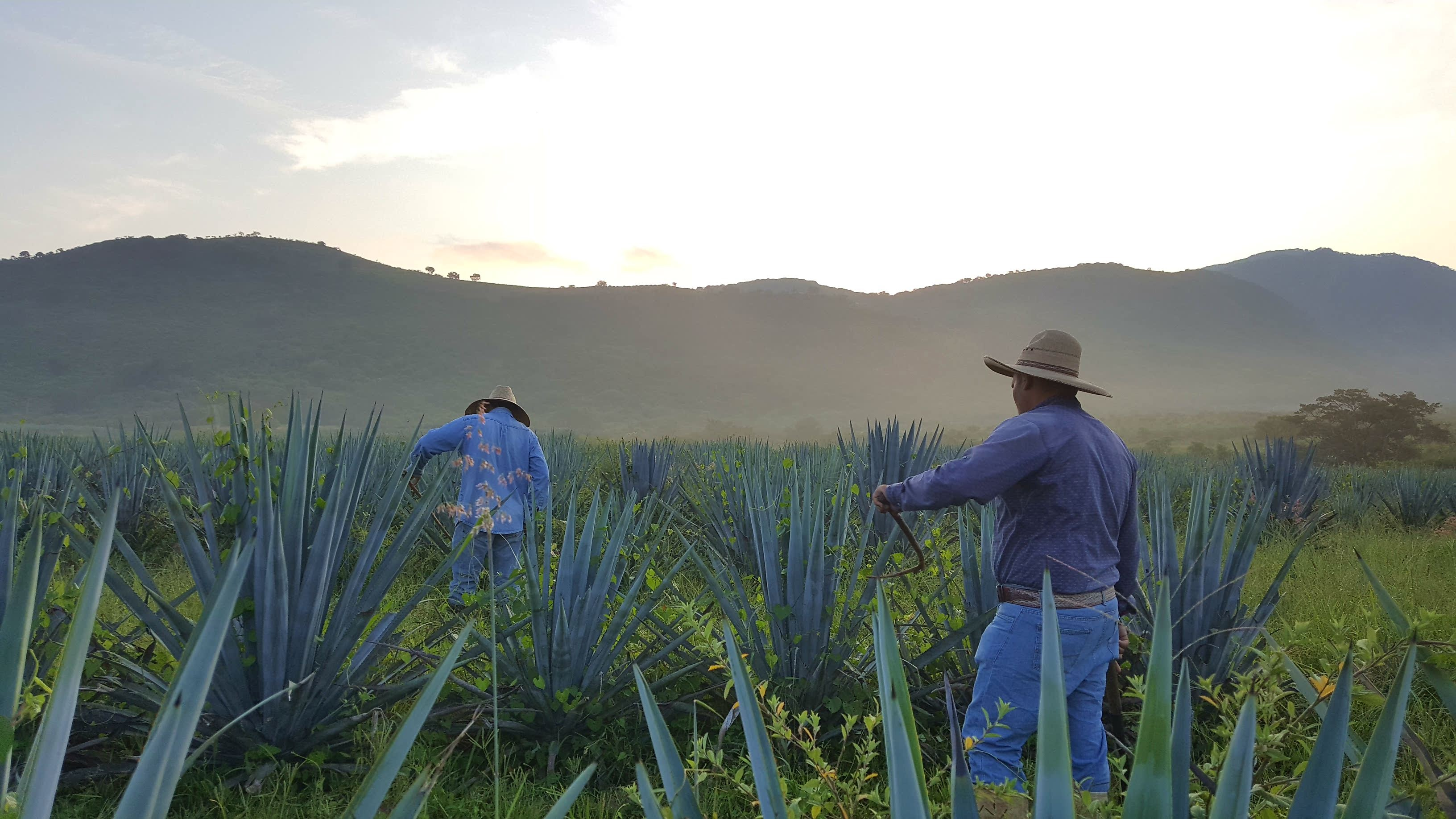 dia de trabajo